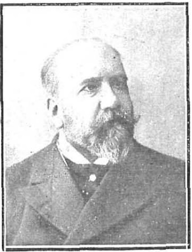 D. Francisco Laiglesia. Gobernador del Banco Hipotecario.FOT. DE COMPAÑY